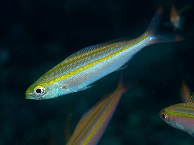 タカサゴ Pterocaesio digramma